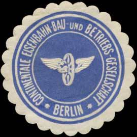 Siegelmarke Continentale Eisenbahn-Bau und Betreibs-Gesellschaft